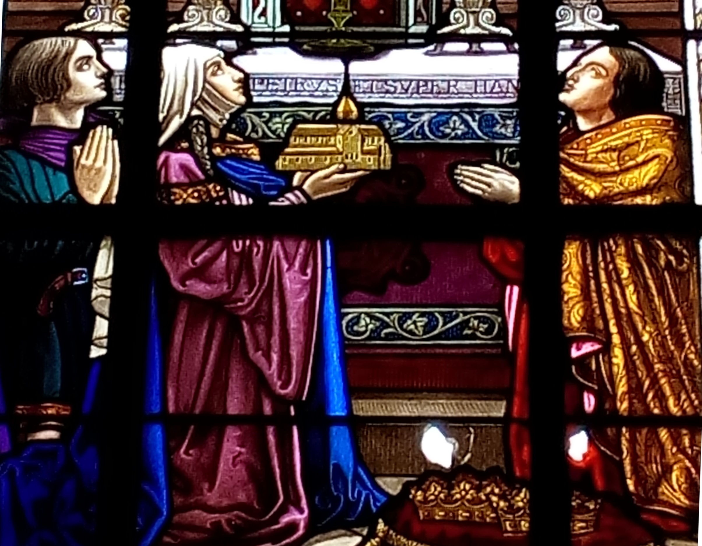 Détail du vitrail montrant Gérard d'Alsace (à droite), son épouse Hadwide et son fils Thierry II (à gauche). La duchesse tient une représentation de l'ancien prieuré.